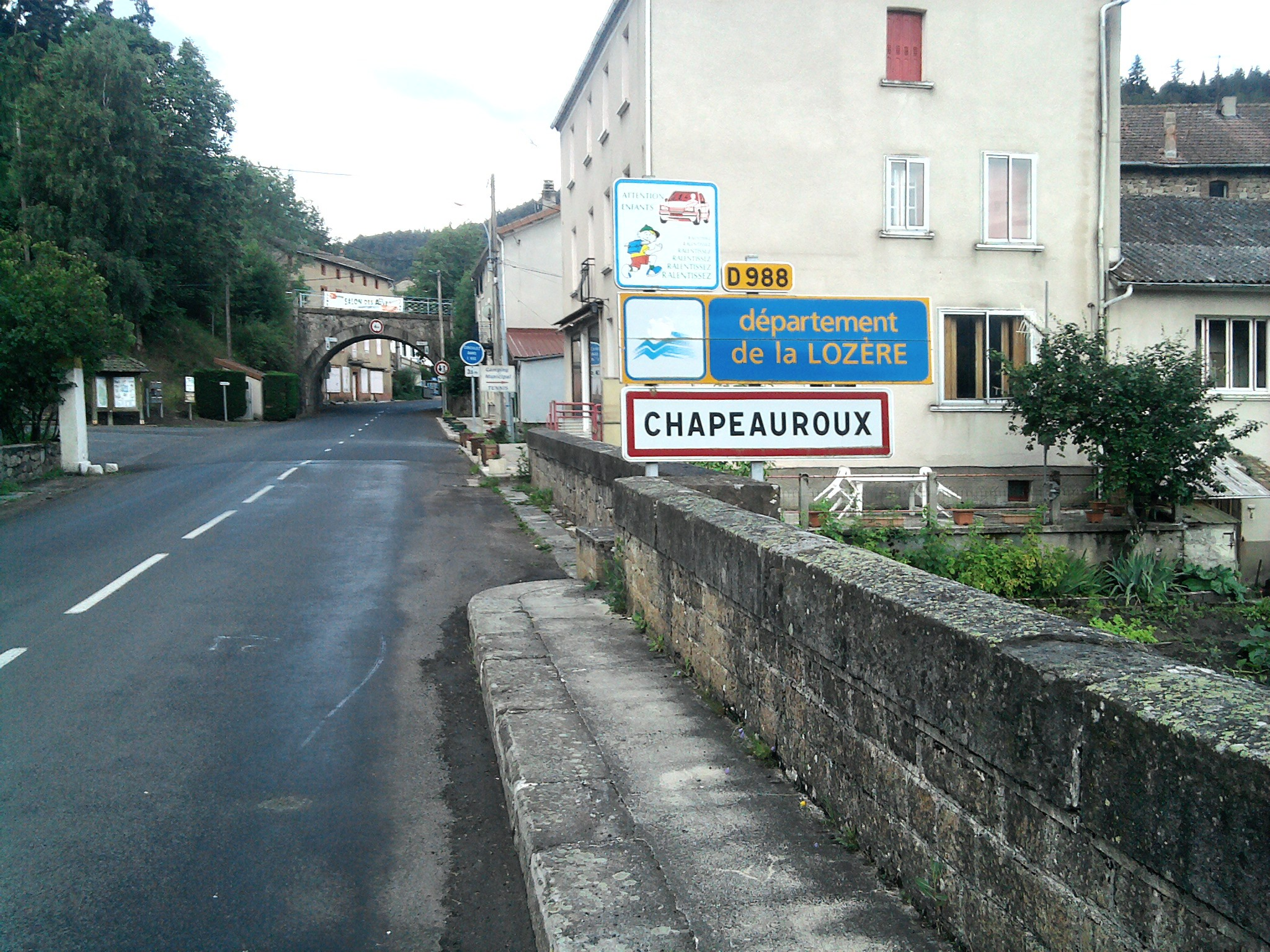 48600 Saint-Bonnet-de-Montauroux, France